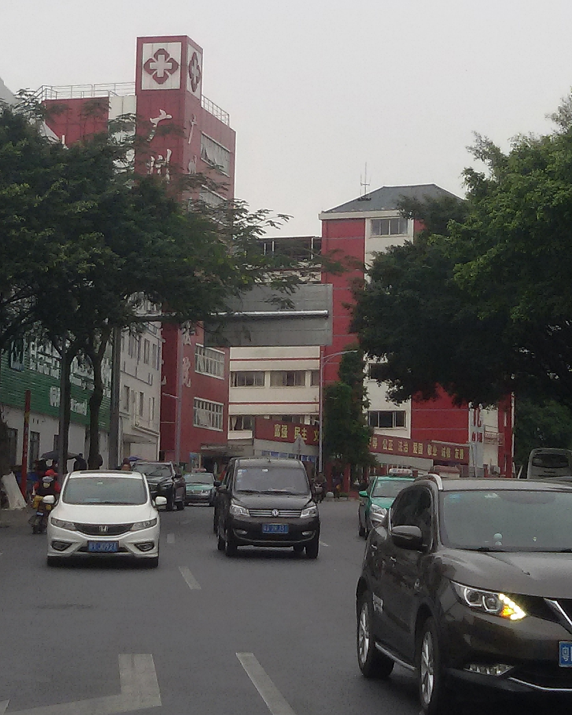 粵語: 廣州白雲山醫院